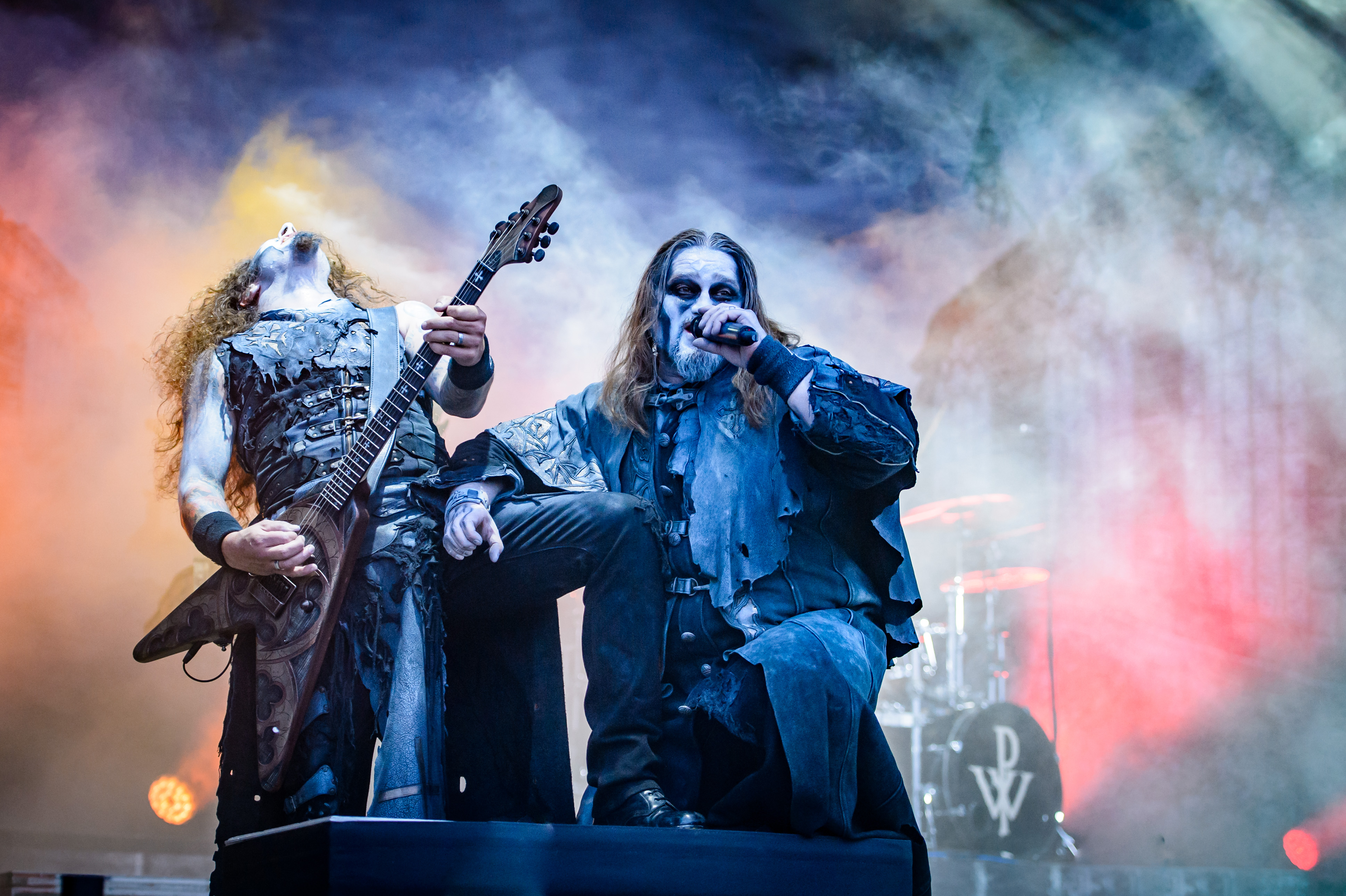 'Summer Breeze Festival 2017; Dinkelsbühl': 'Powerwolf'